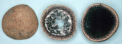 Elaphomyces muricatus